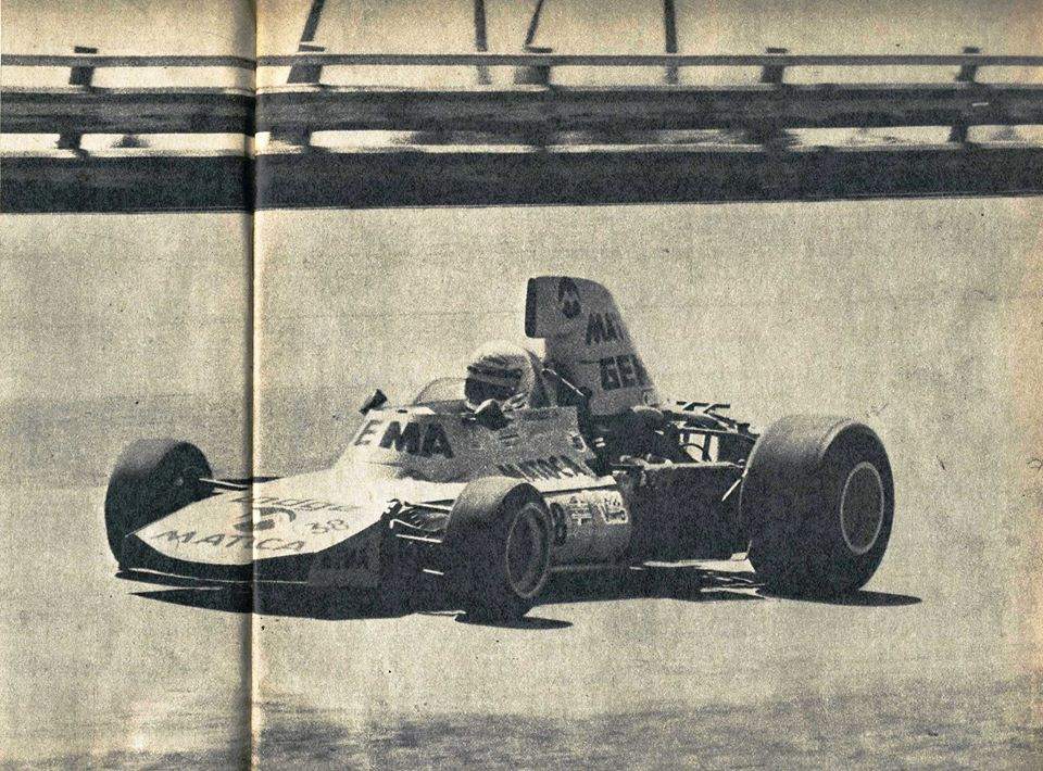 Ángel Monguzzi en su Pianetto M/4-Dodge en las 500 Millas de Rafaela de 1977, carrera que ganó.